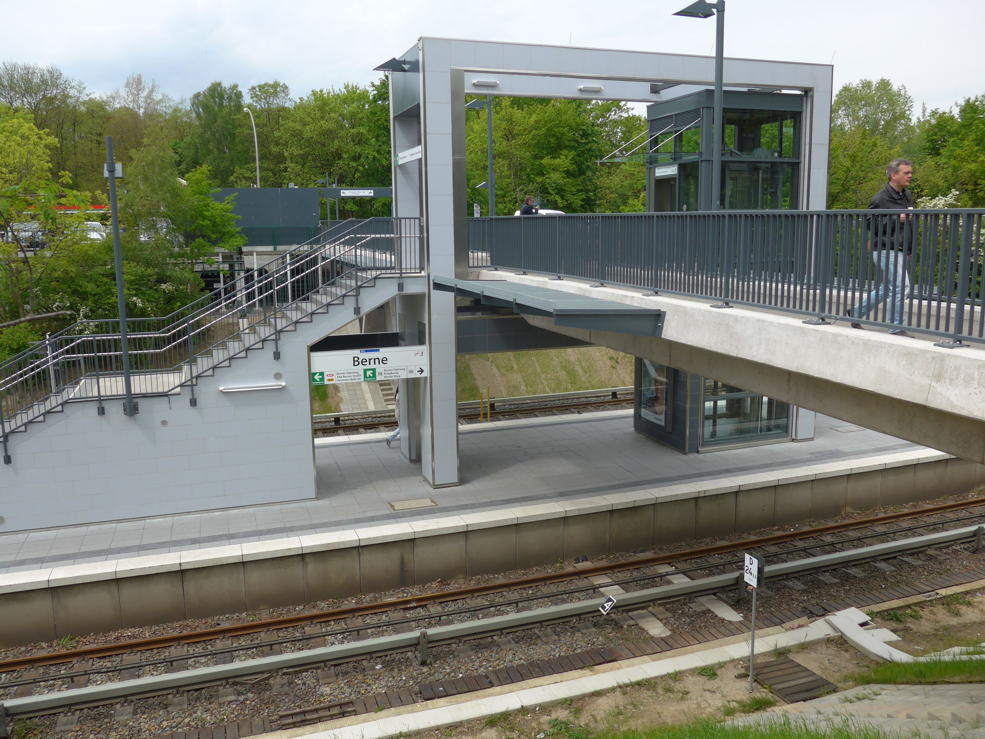 Barrierefreier Zugang am U-Bahnhof Berne